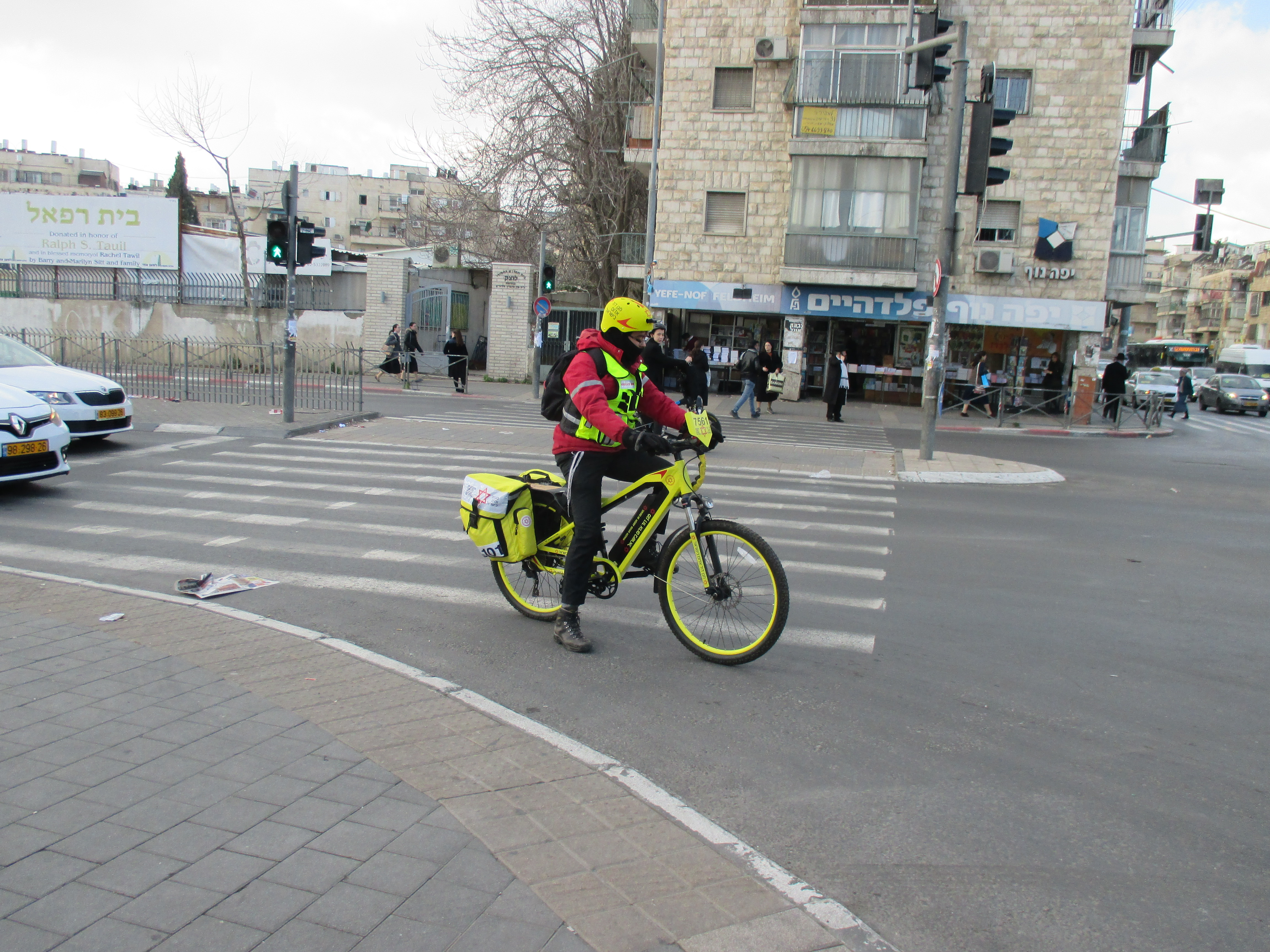 אופניים חשמליים בשימוש מד"א